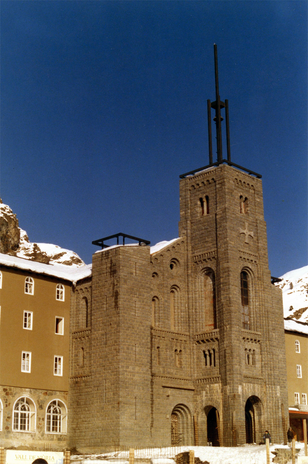 Santuari de Núria, Ripollès. Santuario de Nuria, Ripollés. Picture take it by Núria Pueyo